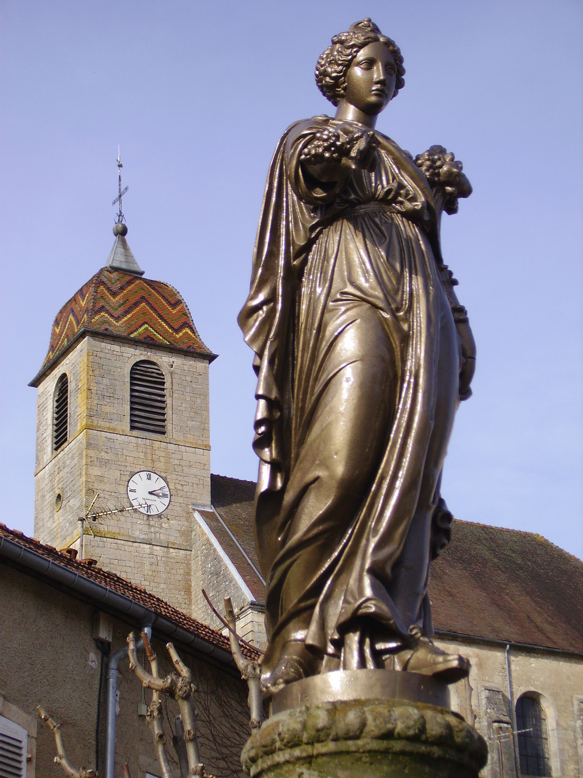 Statue de l'abondance et clocher de Rupt-sur-Saône